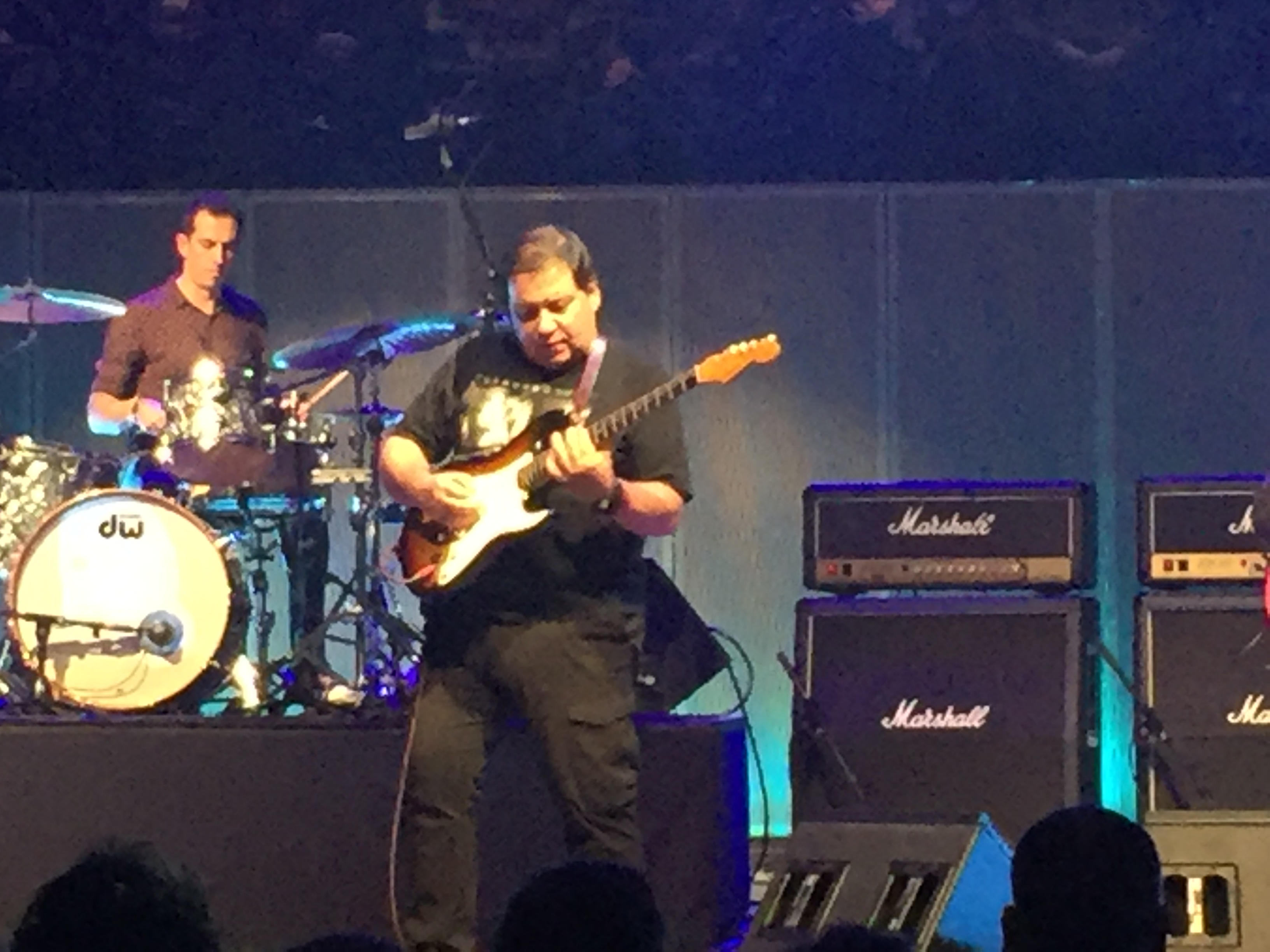 Guitarrista Renato Gomes, convidado dos UHF, em concerto na Casa da Música em 29-12-2018.